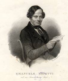 Emanuele Repetti (1776—1852)